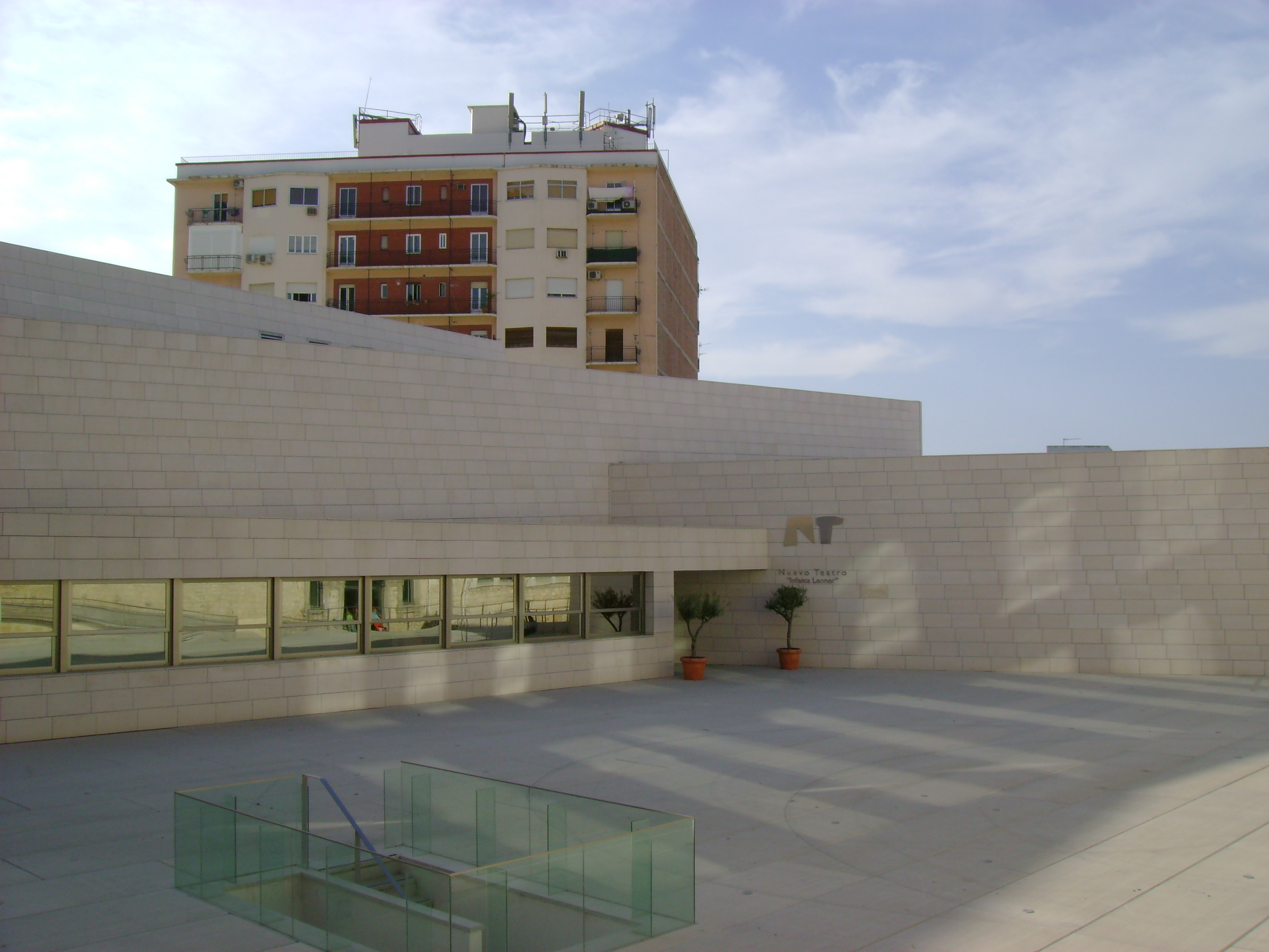 Nuevo Teatro Infanta Leonor de Jaén.